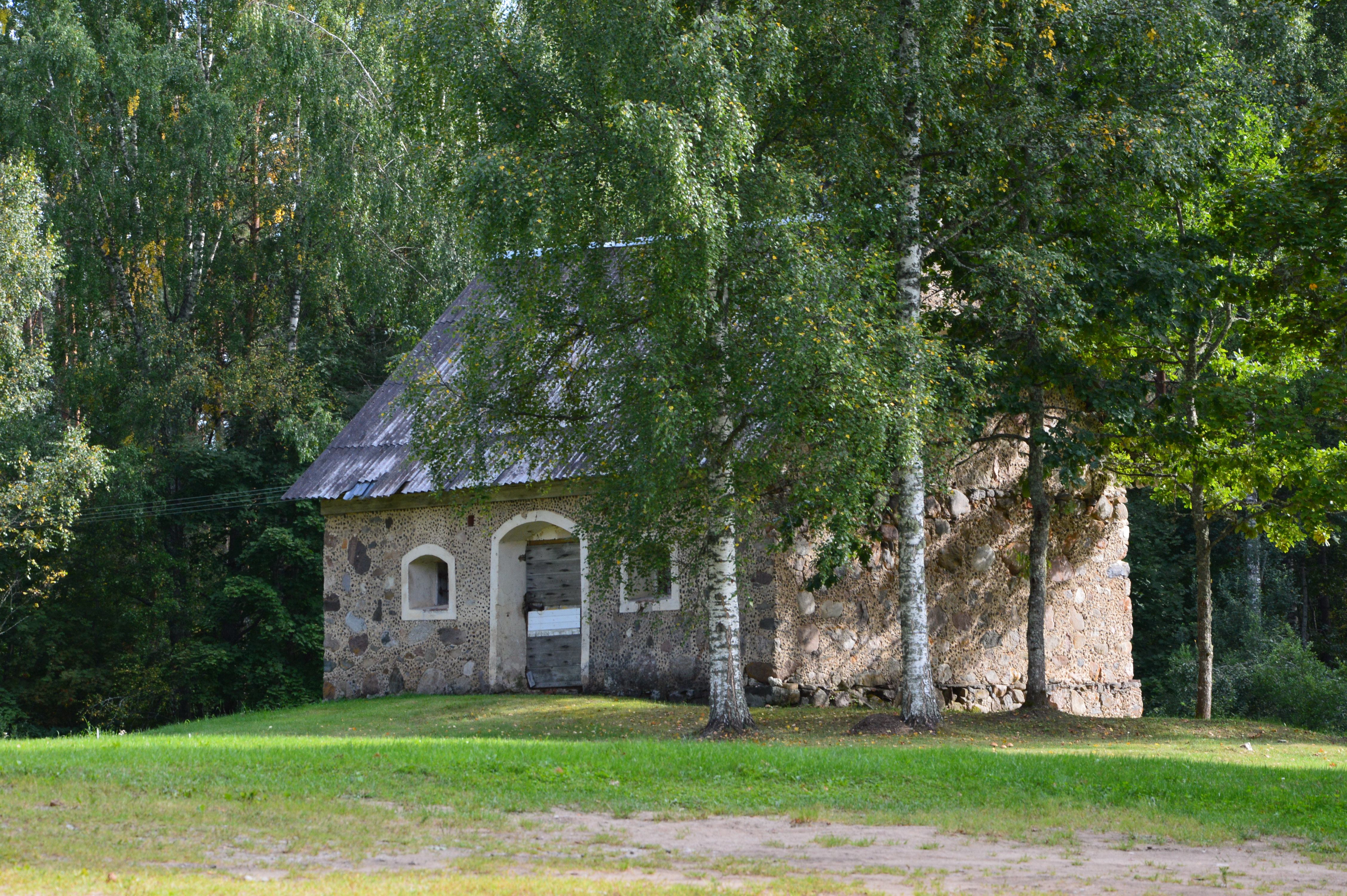 Kalli postijaama ait